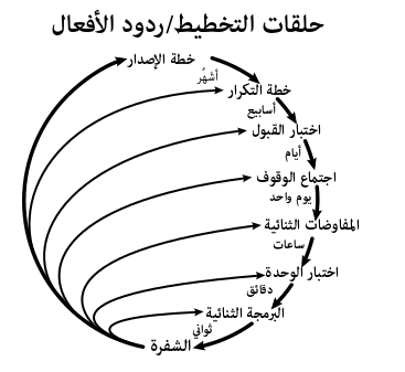 برمجة قصوى (xp) يتطلب التخطيط وردود الأفعال على العديد من المستويات والعديد من الترددات.